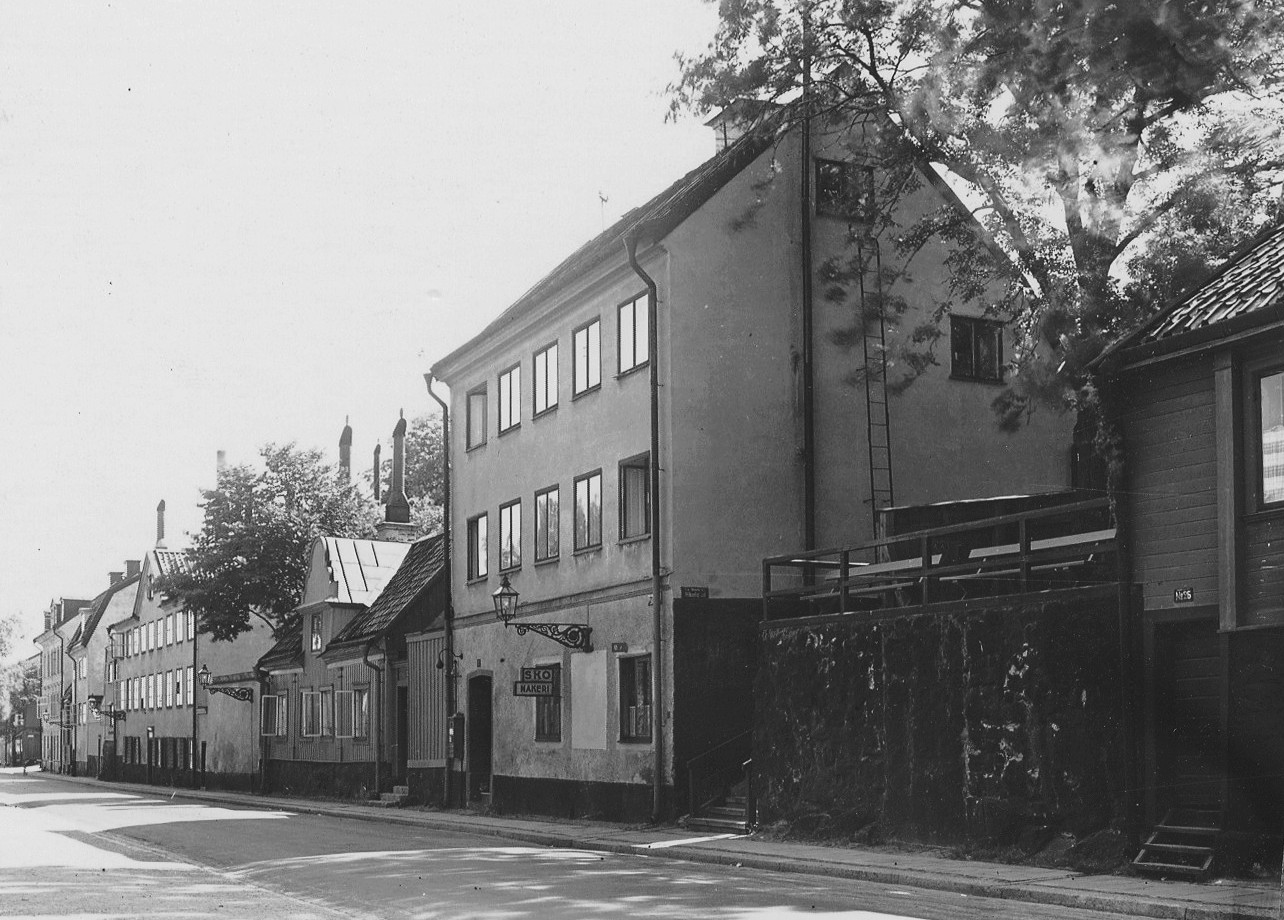 Fjällgatan 30 (närmast), 32, 34, vy österut